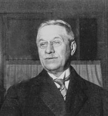 Mr Merlin, à son arrivée à la gare d'Orsay : photographie de presse